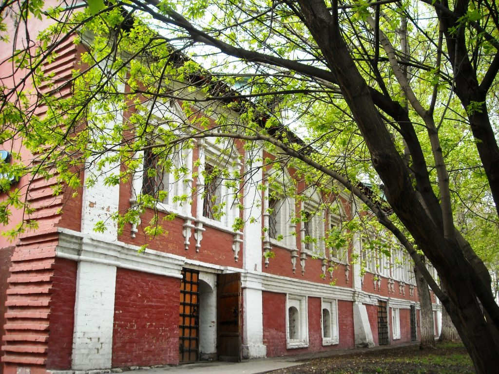 Палаты Головина - Голицыных в Москве (Остоженка, 1)